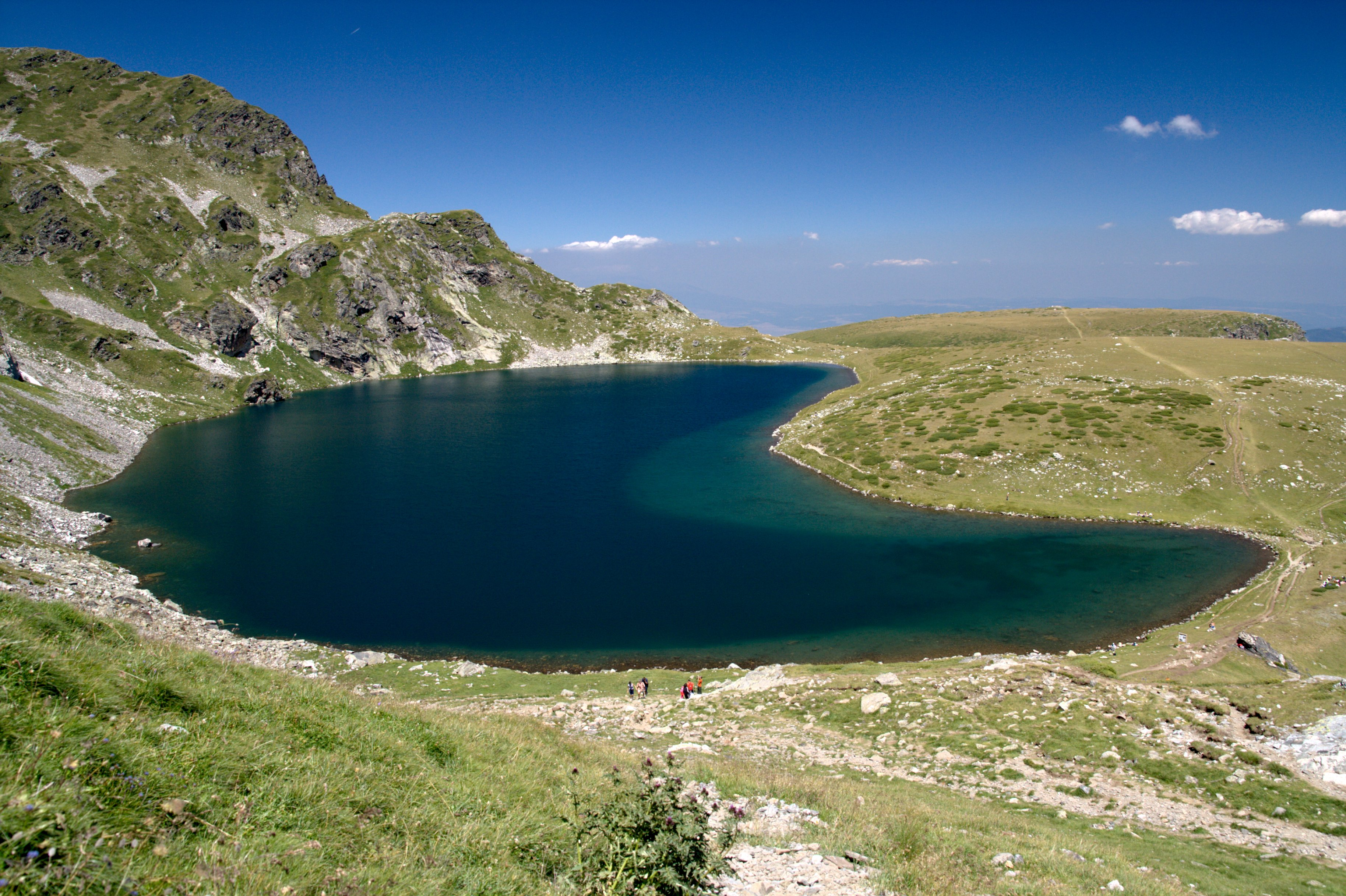 Babreka ezero (el riñón), macizo de Rila.